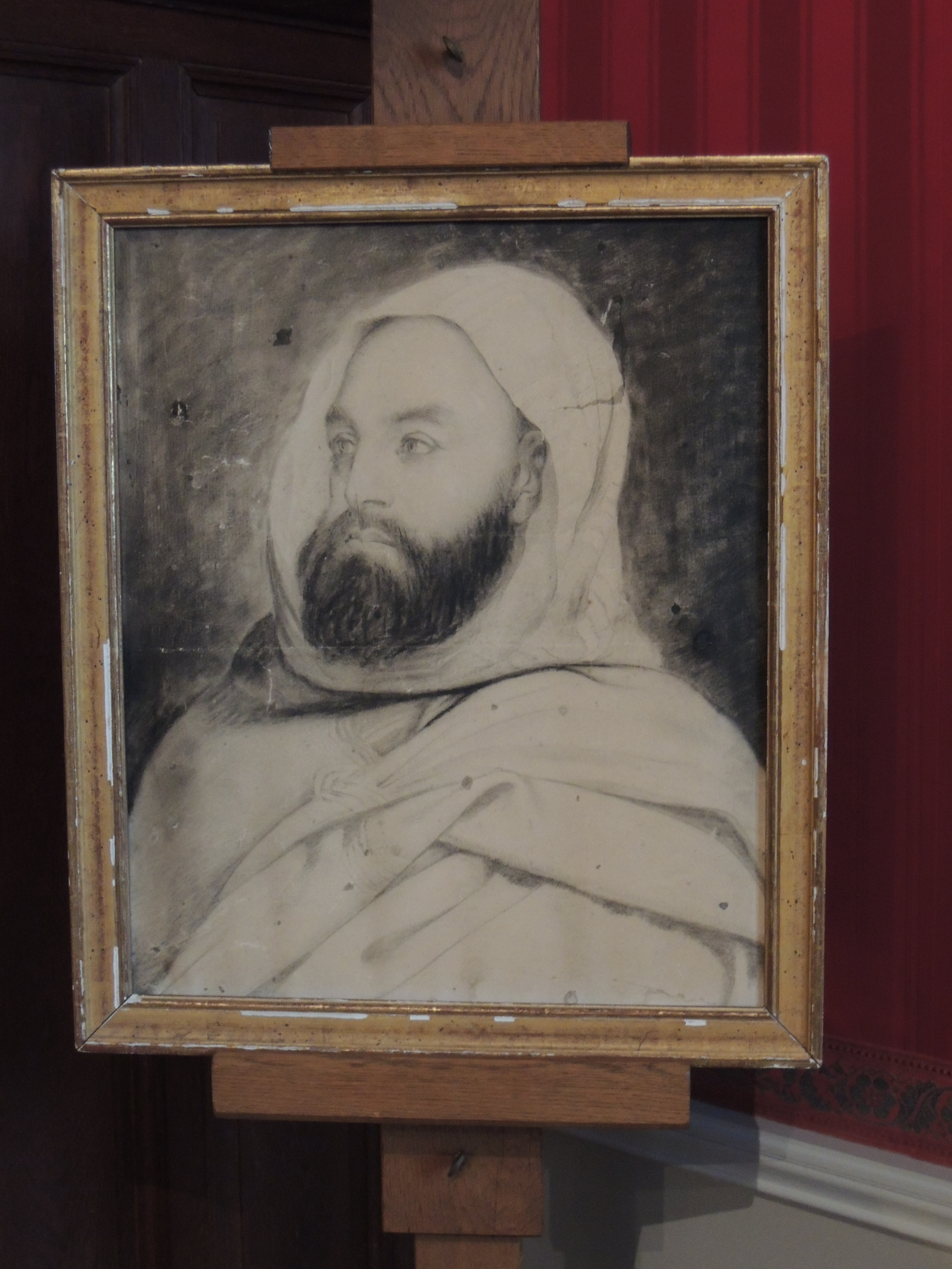 Portrait d'Abd el-Kader au château d'Amboise.